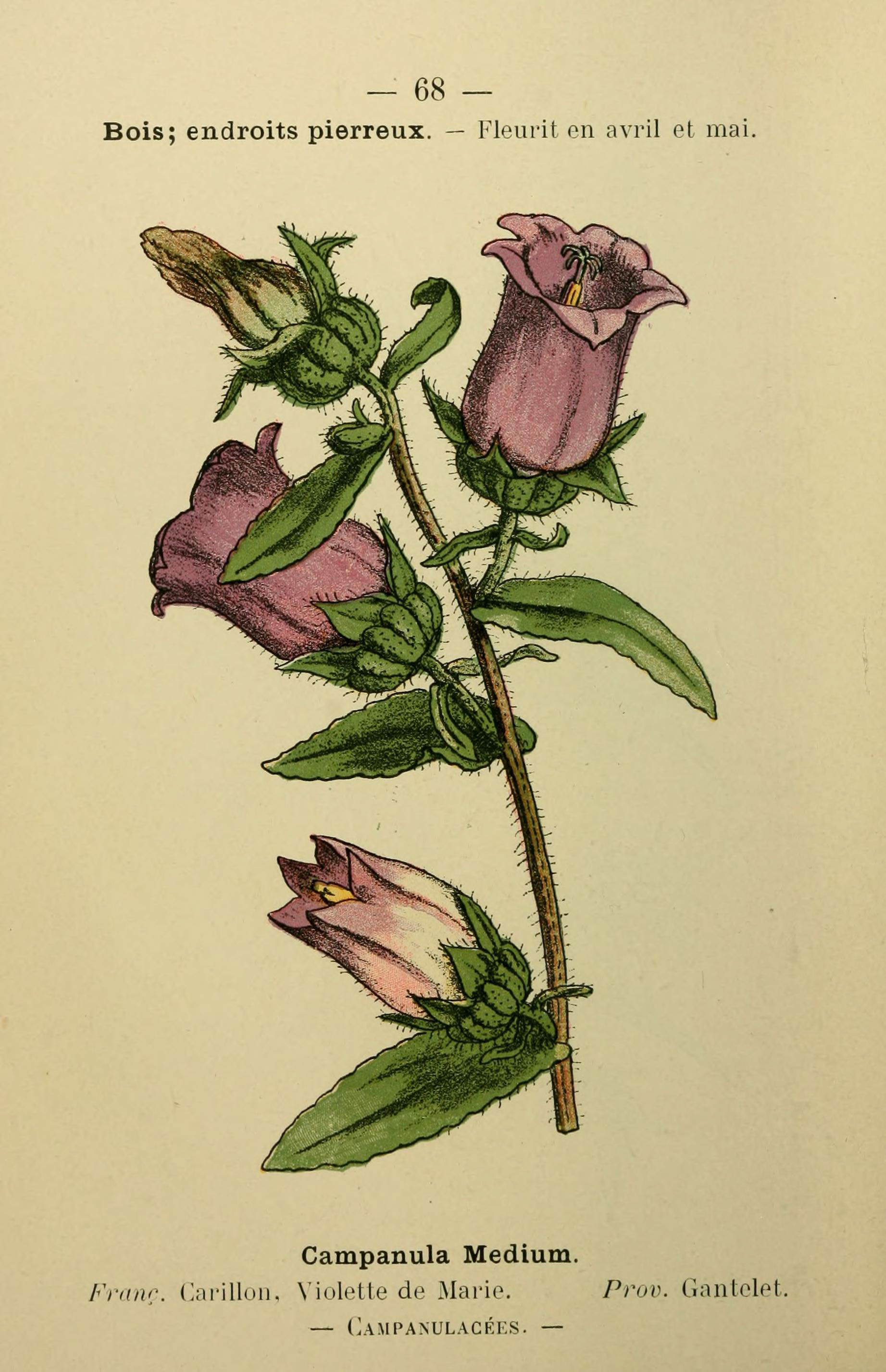 — 68 — Bois; endroits pierreux. — Fleurit en avril et mai. Campanula Médium. Fiiinr. Cni'illon. N'iolette de Marie. Prov. Gantelet. — (Iampanulackf.s. —